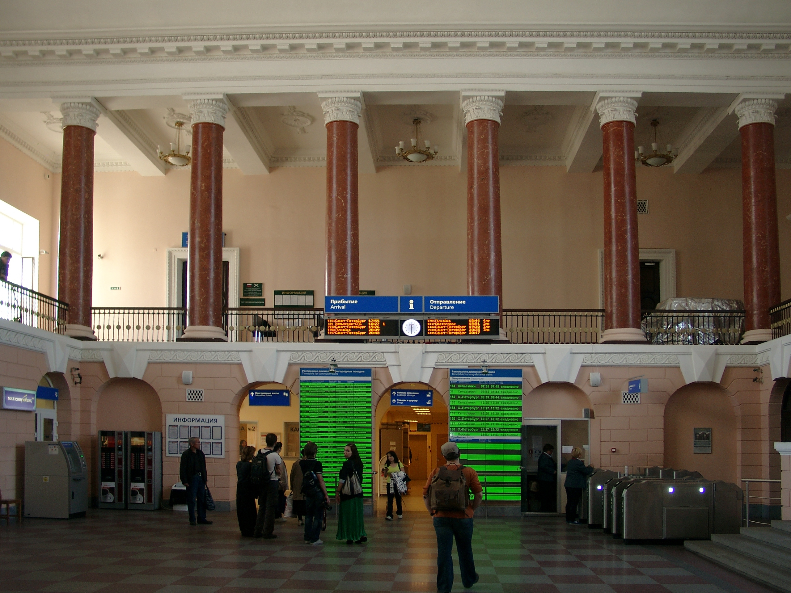 Интерьер вокзала станции Выборг, Ленинградская область, Россия.